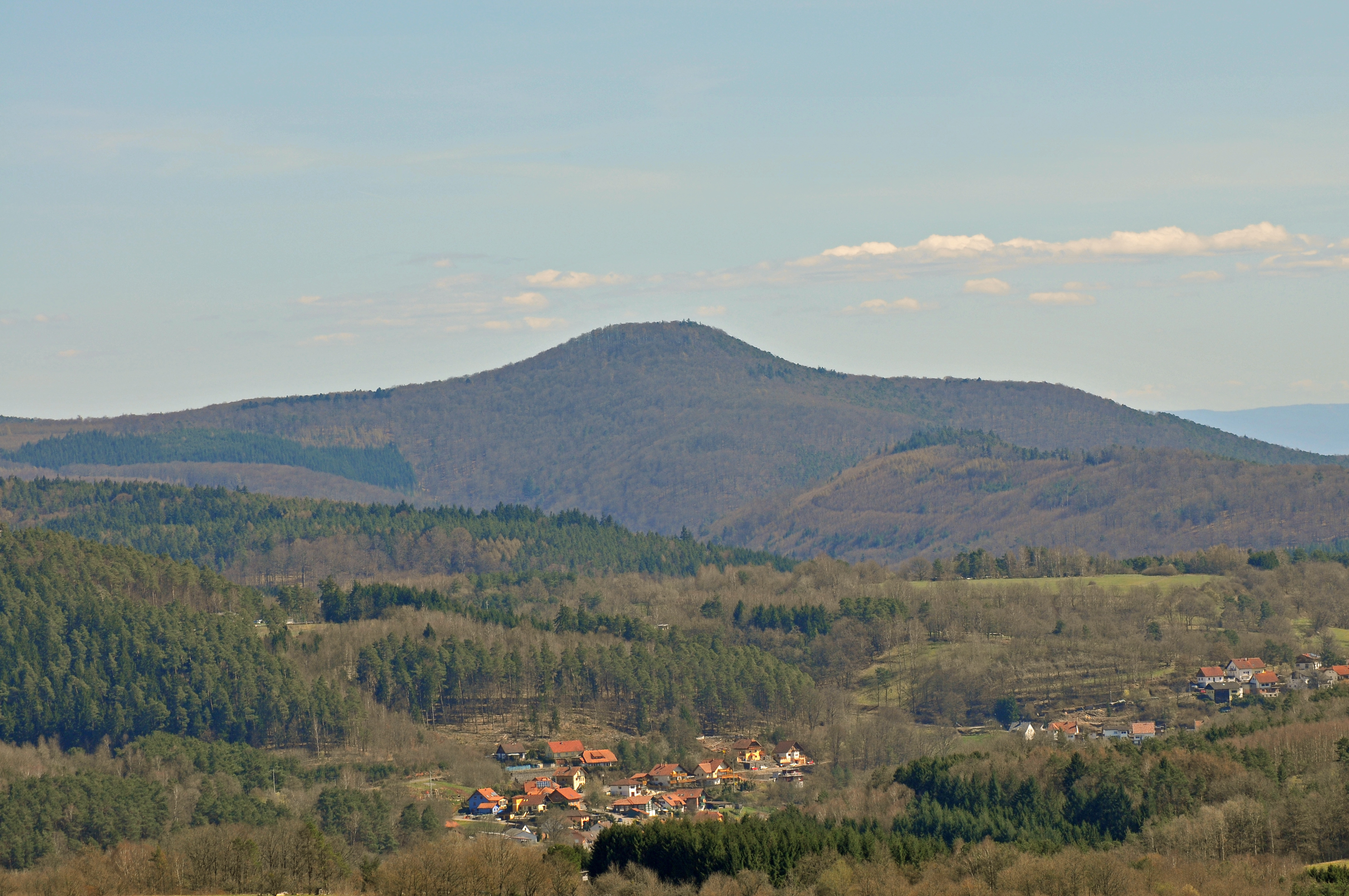 Bobenthaler Knopf, im Vordergrund die Gemeinde Bundenthal, im rechten Hintergrund der Nordschwarzwald. Das Bild wurde vom Napoleonfels aufgenommen.